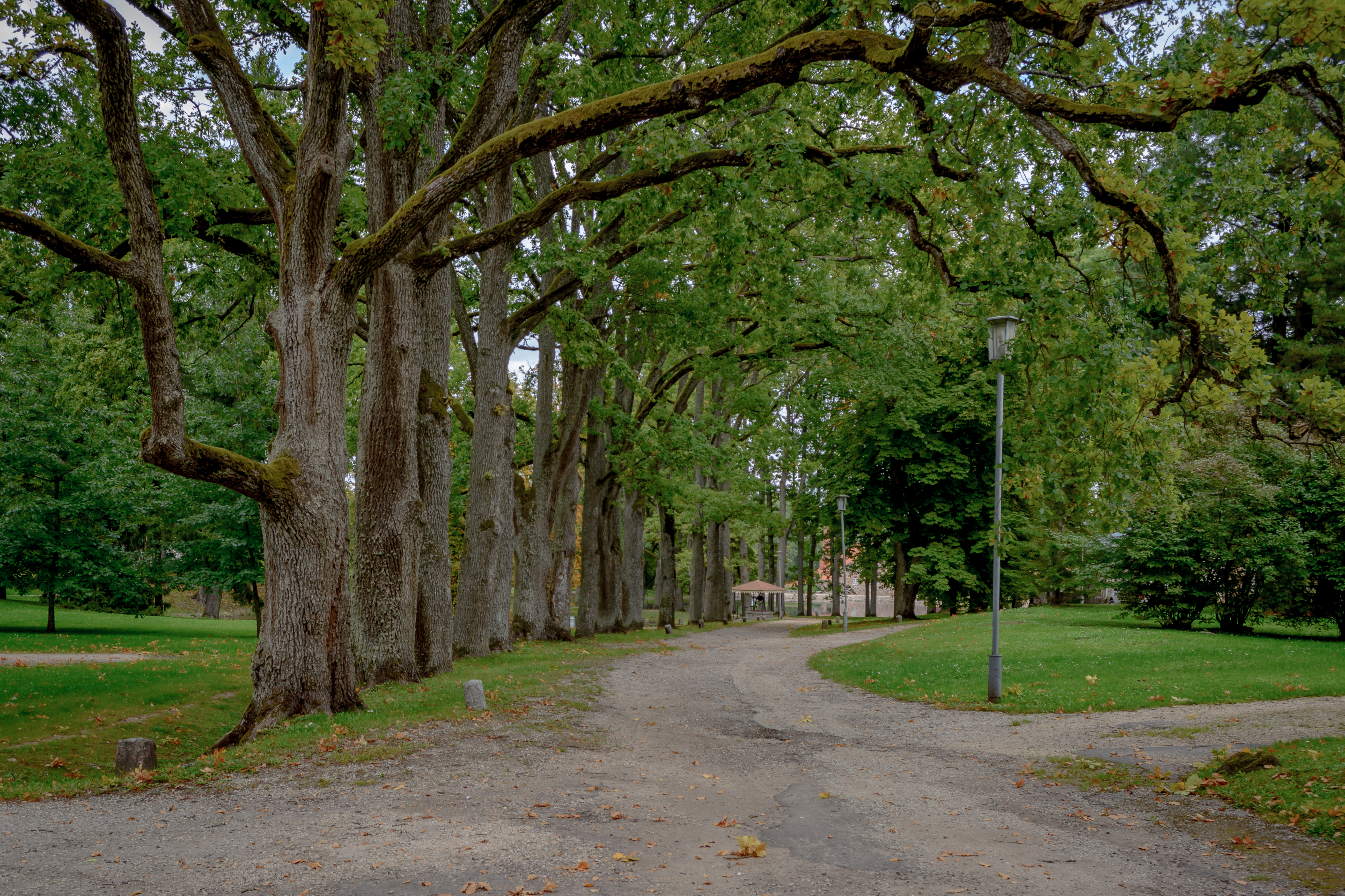 Olustvere mõisa park, 19.-20.saj.